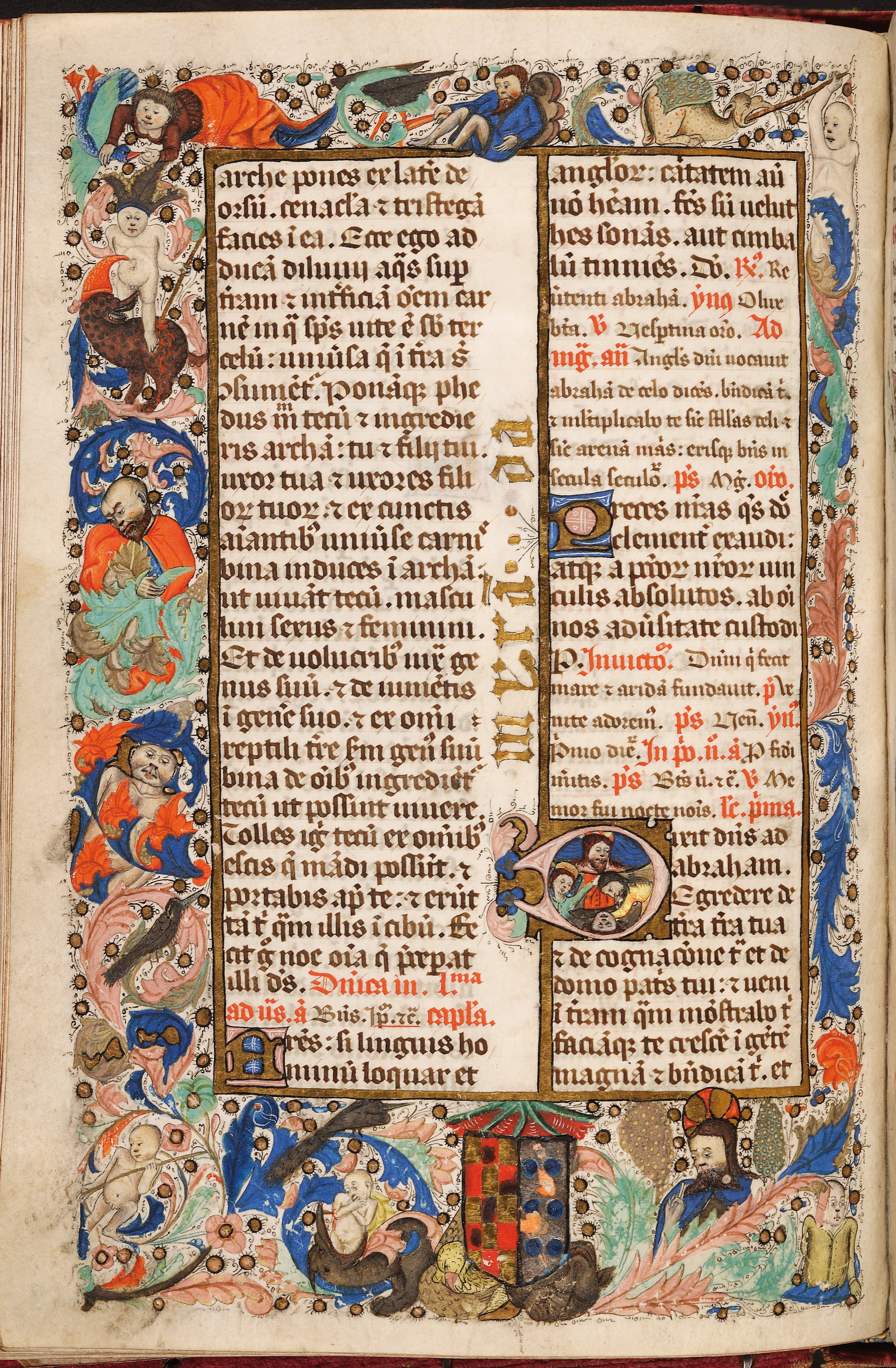 Folio 49v do Breviario de Miranda.